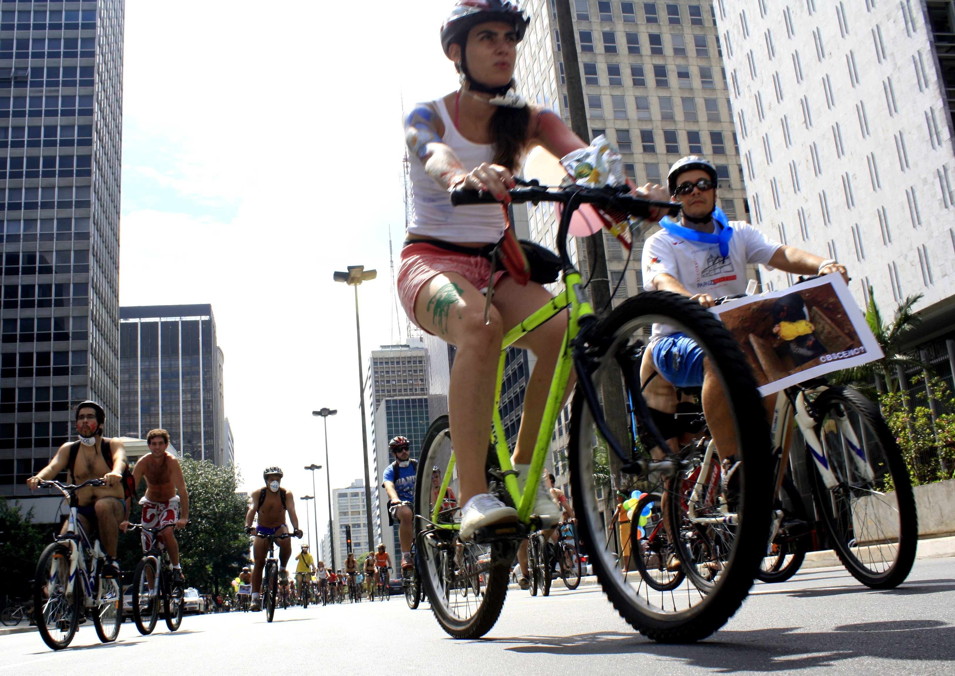 Cicloativistas na bicicletada - massa crítica da avenida Paulista em 2009